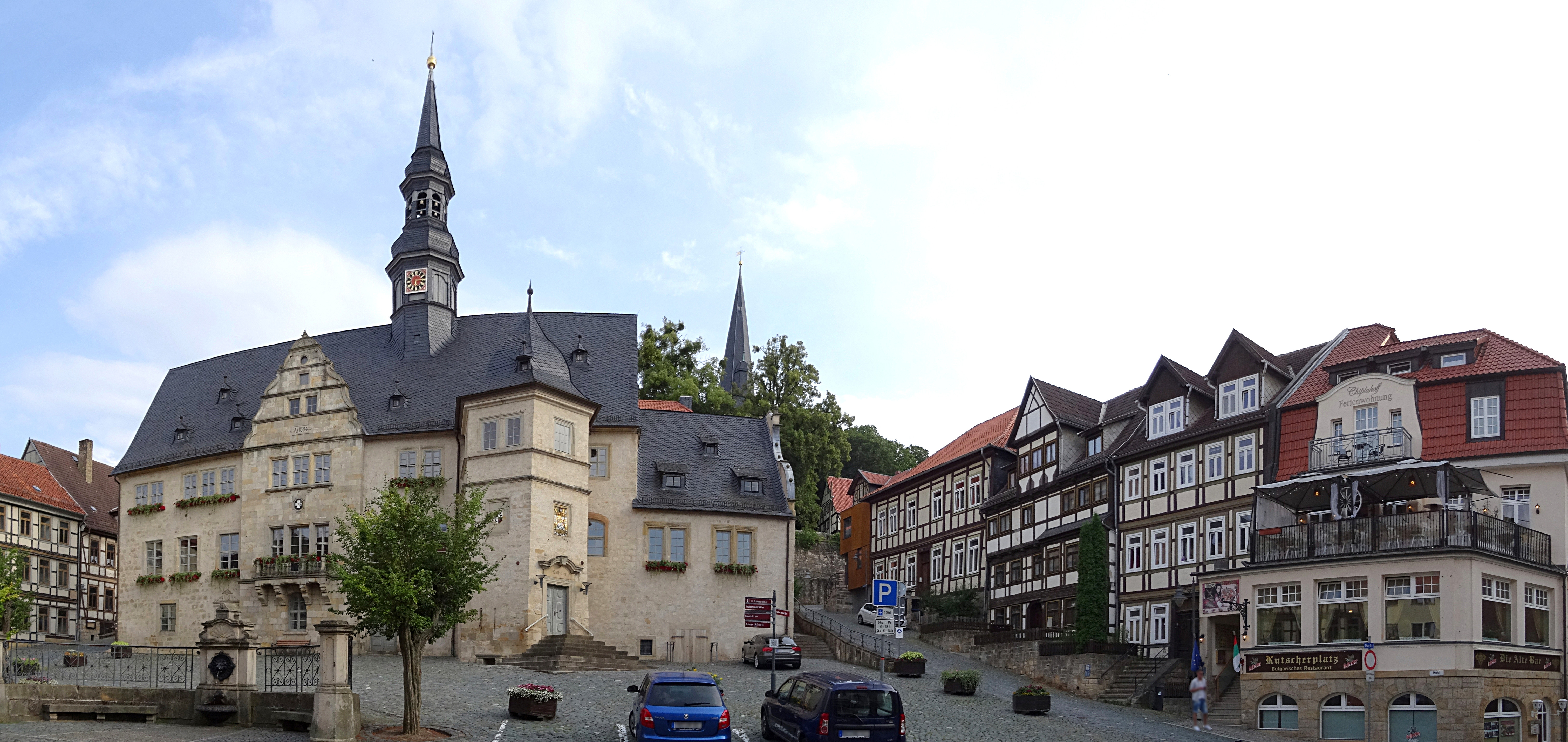 Blankenburger Marktplatz mit Rathaus